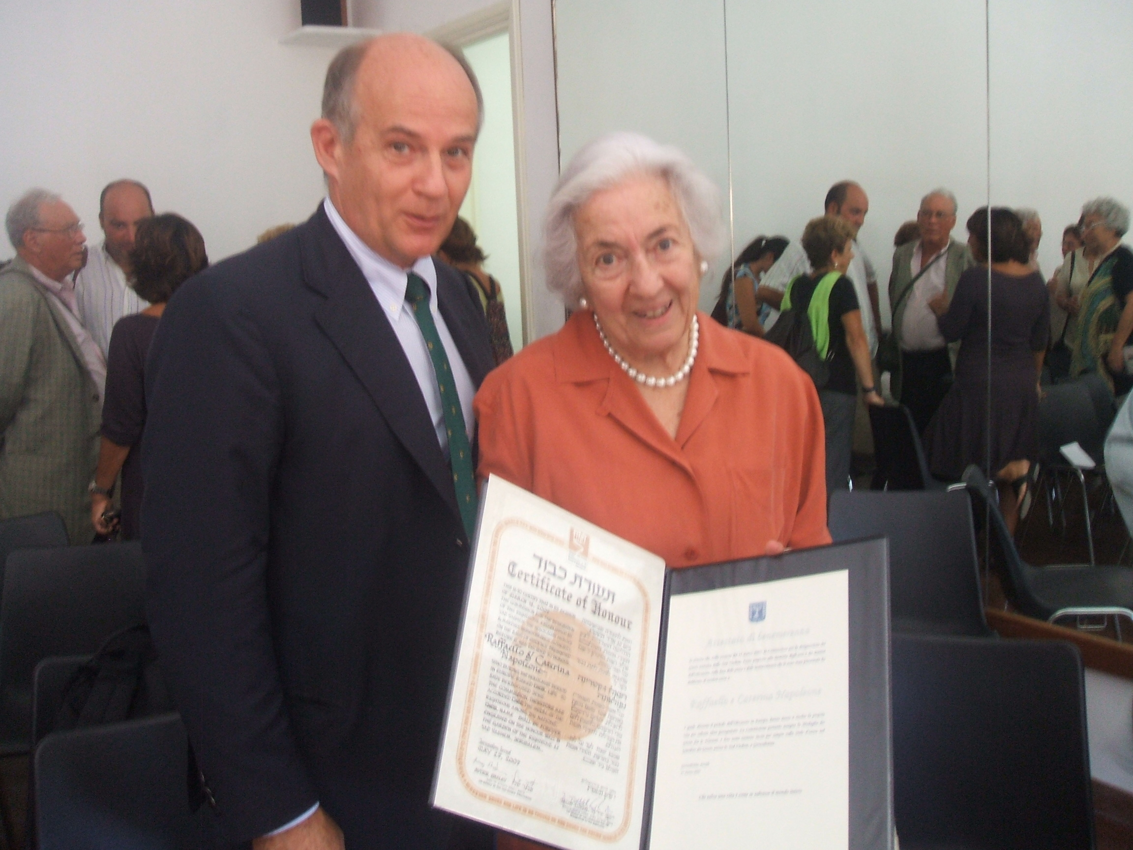 תעודת הכבוד עם קתרינה נפוליאונה, נכדתם של רפאלו וקתרינה נפוליאונה